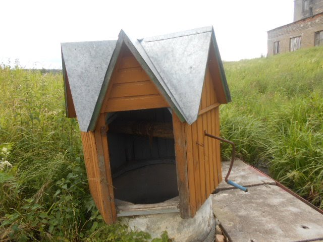 Родник в канаве